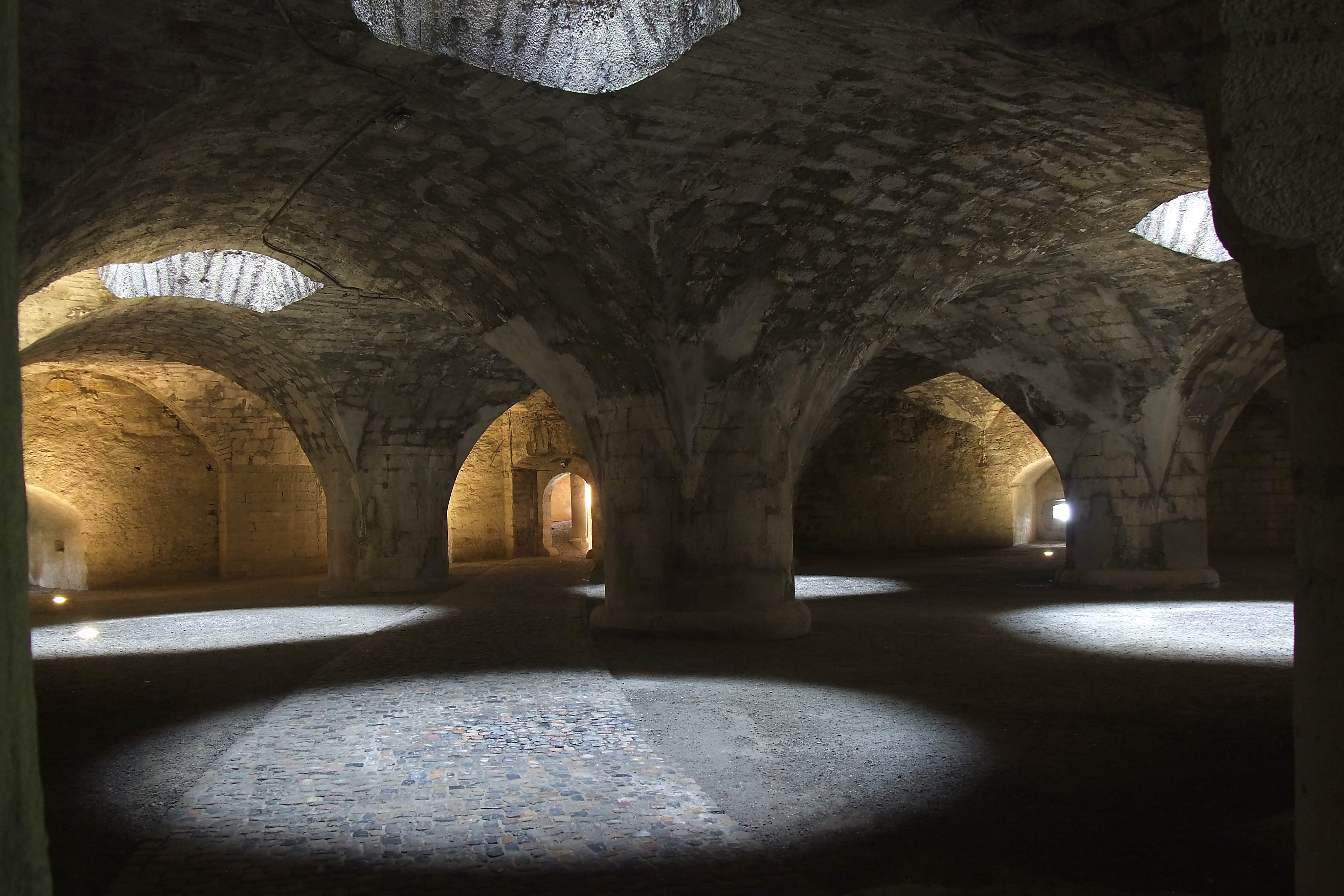 Schaffhausen, Munot, Kasematte